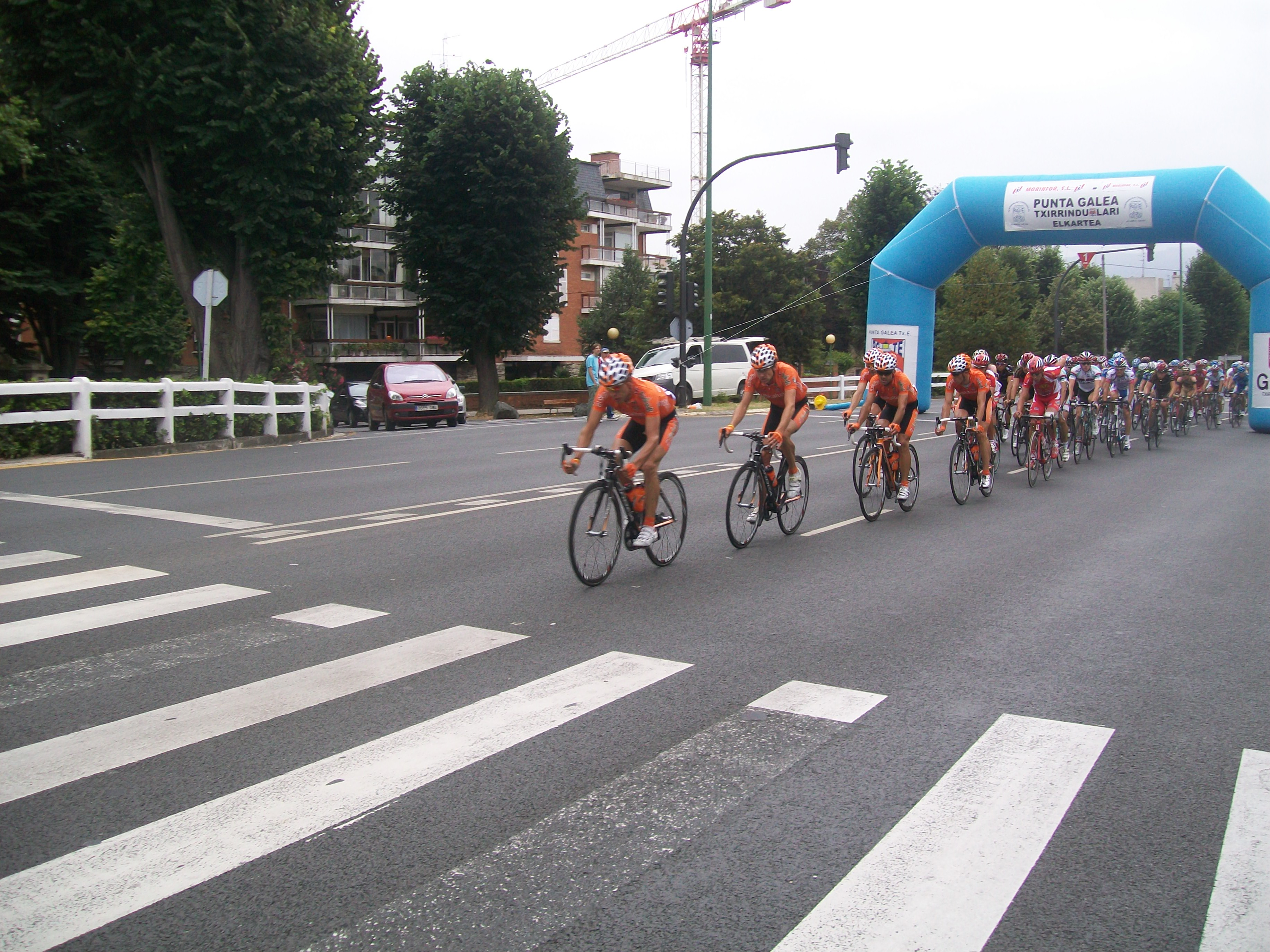 Pelotón en el Circuito de Getxo